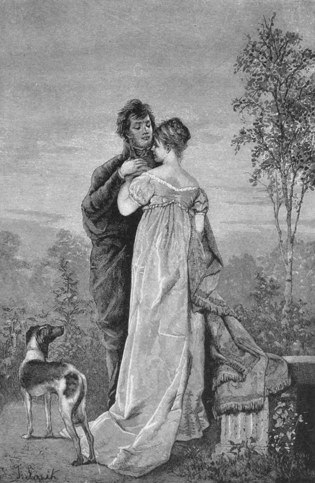 Pożegnanie Adama Mickiewicza z Marylą Wereszczakówną